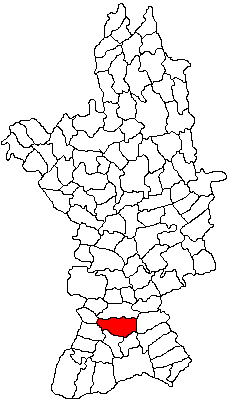 Categorie:Hărţi ale judeţului Olt